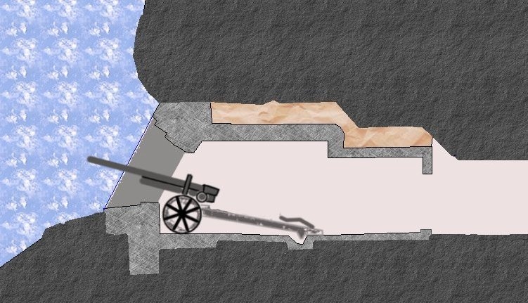 Zeichnung eines Feldgeschützes in einem Felswerk